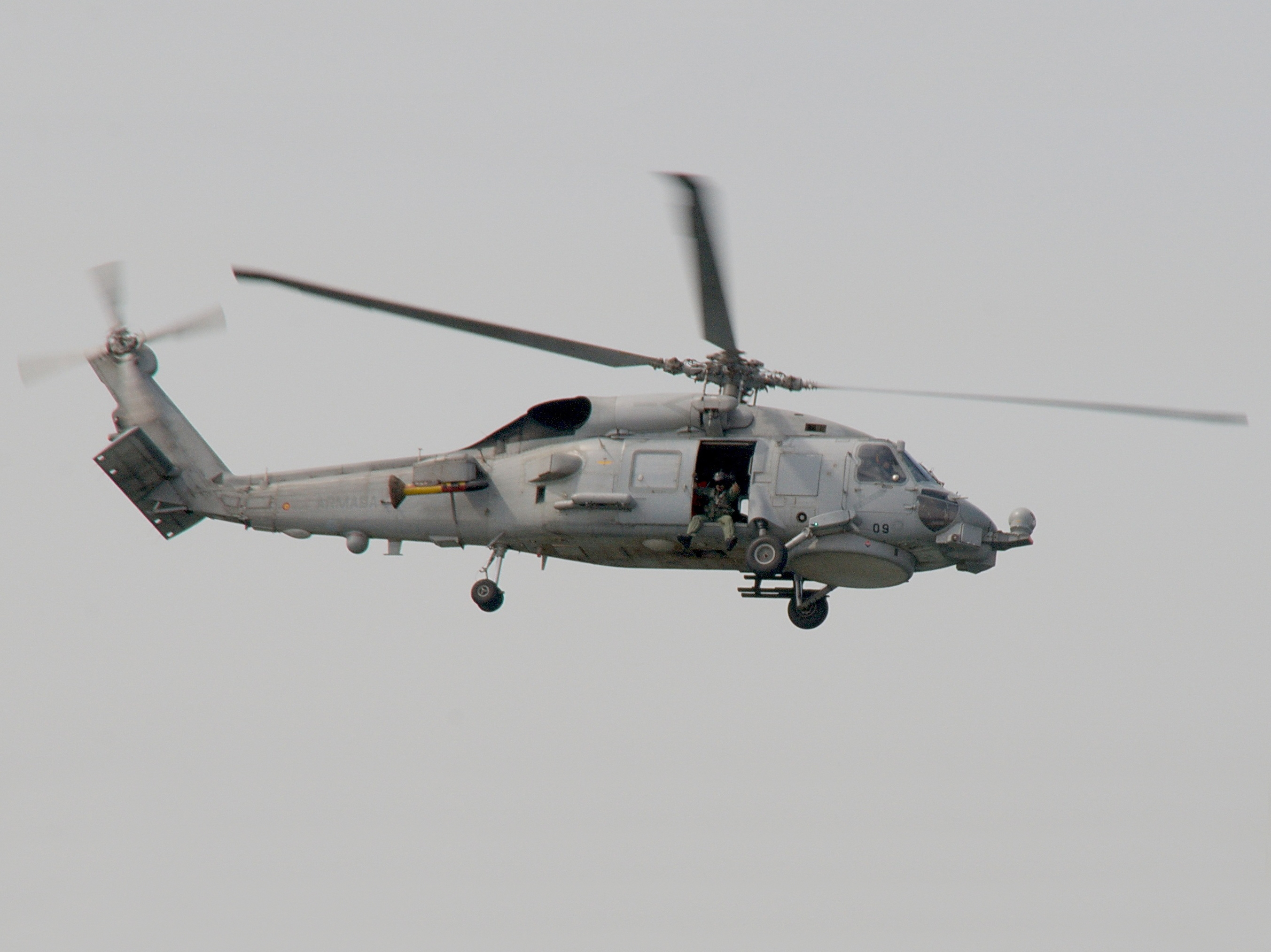 SH-60B LAMPS Mk III de la Armada Española en el Festival Aérea de Cádiz de 2009